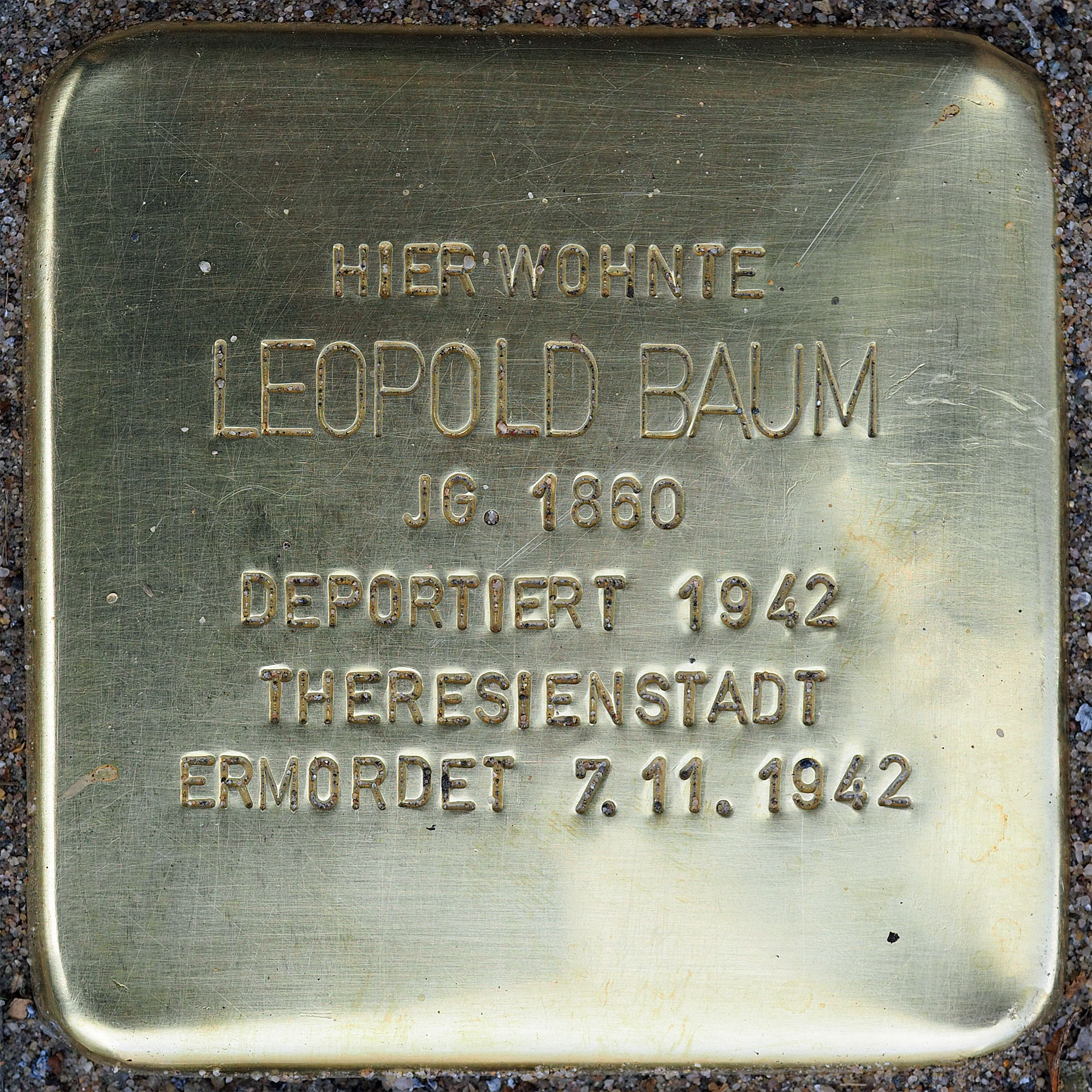 Stolpersteine Suechteln: Baum, Leopold